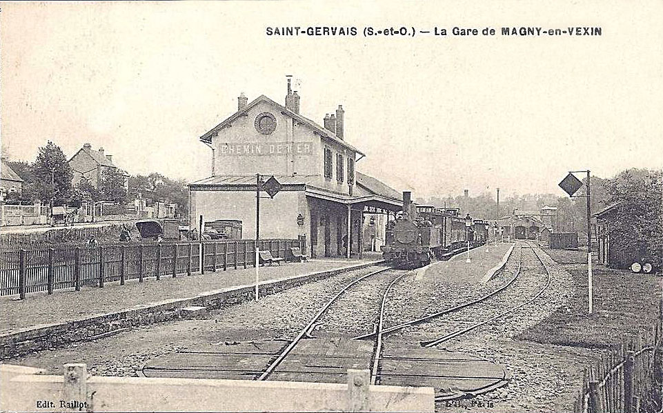 La gare de Magny-en-Vexin (qui n'est pas située sur la commune de St-Gervais, contrairement à ce que la légende suggère).